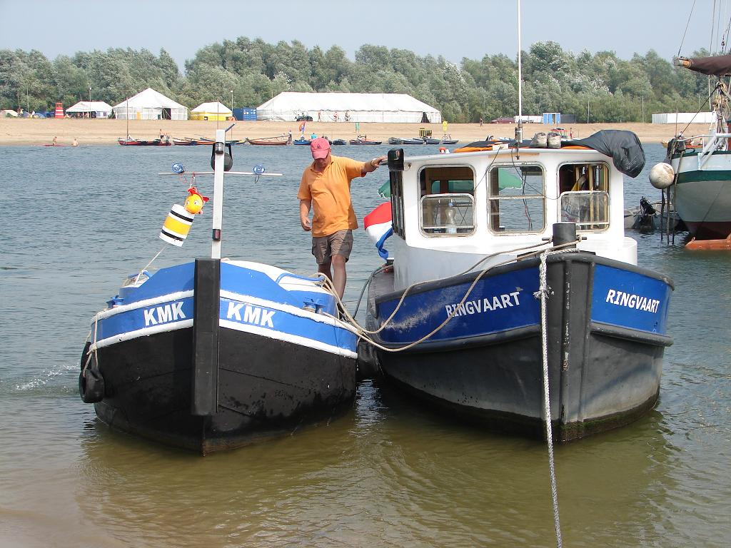 Slepers op het NaWaKa, de Kort Maar Krachtig en de RINGVAART